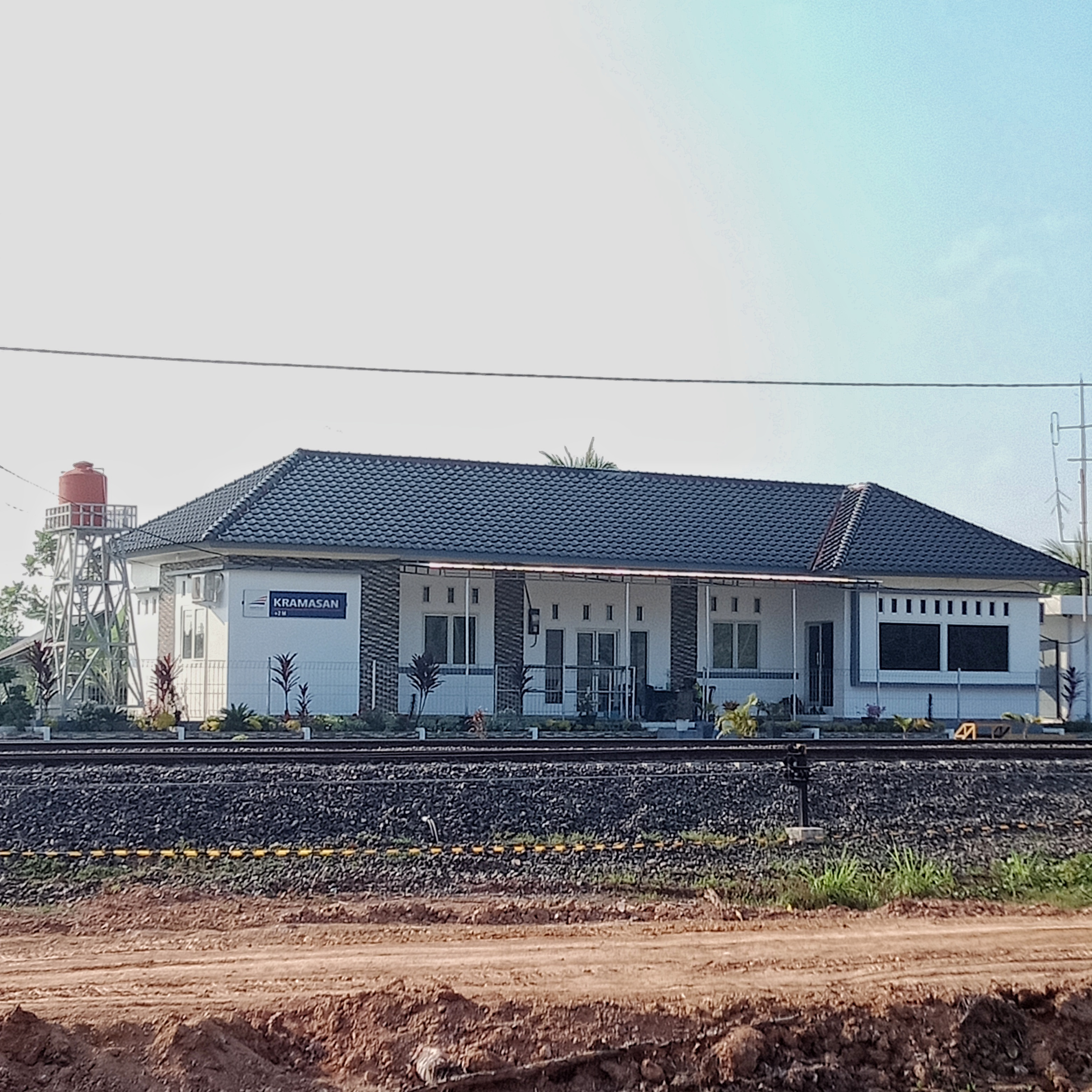 Bangunan utama Stasiun Keramasan, 2019